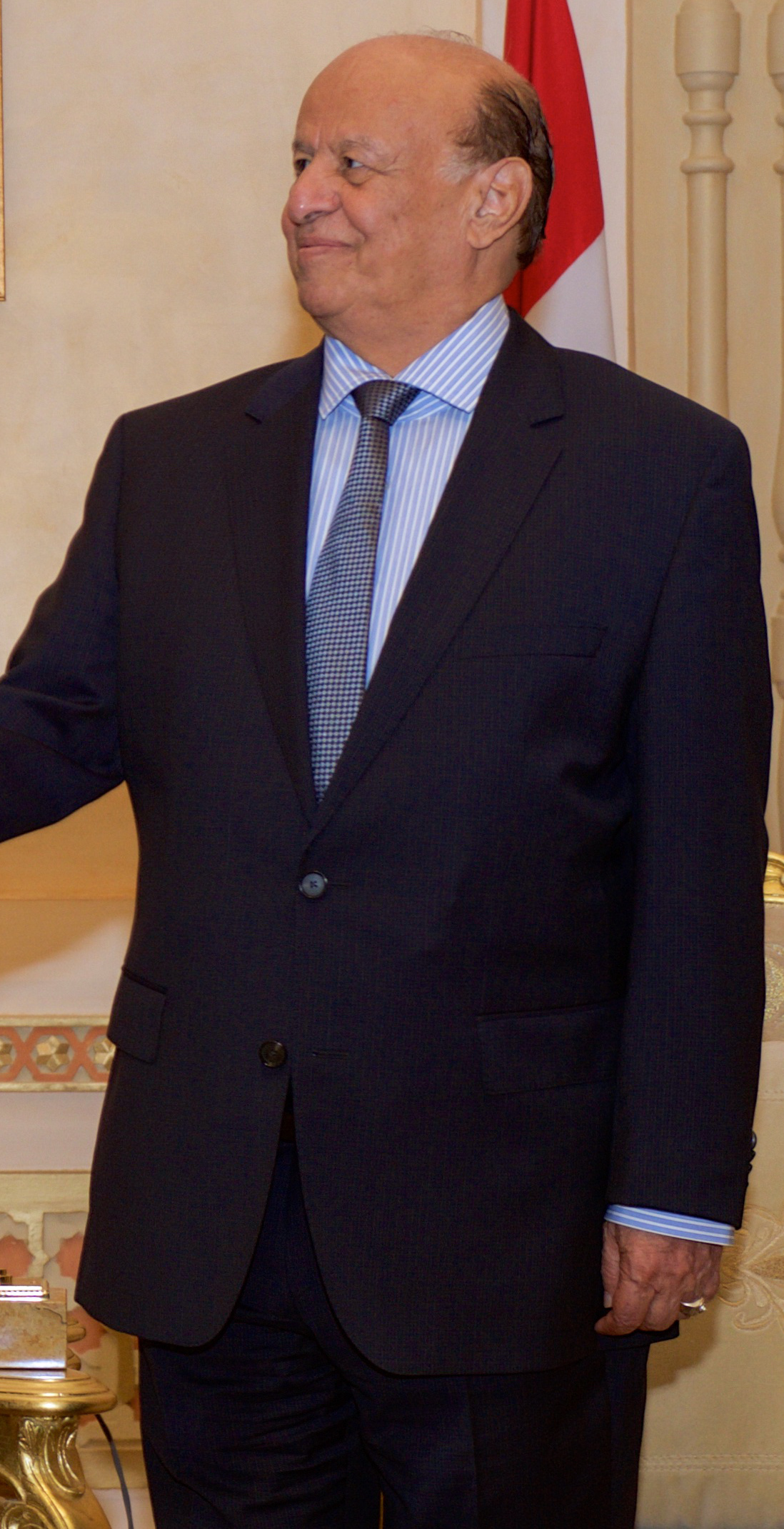 Abd Rabbuh Mansur Hadi en 2015